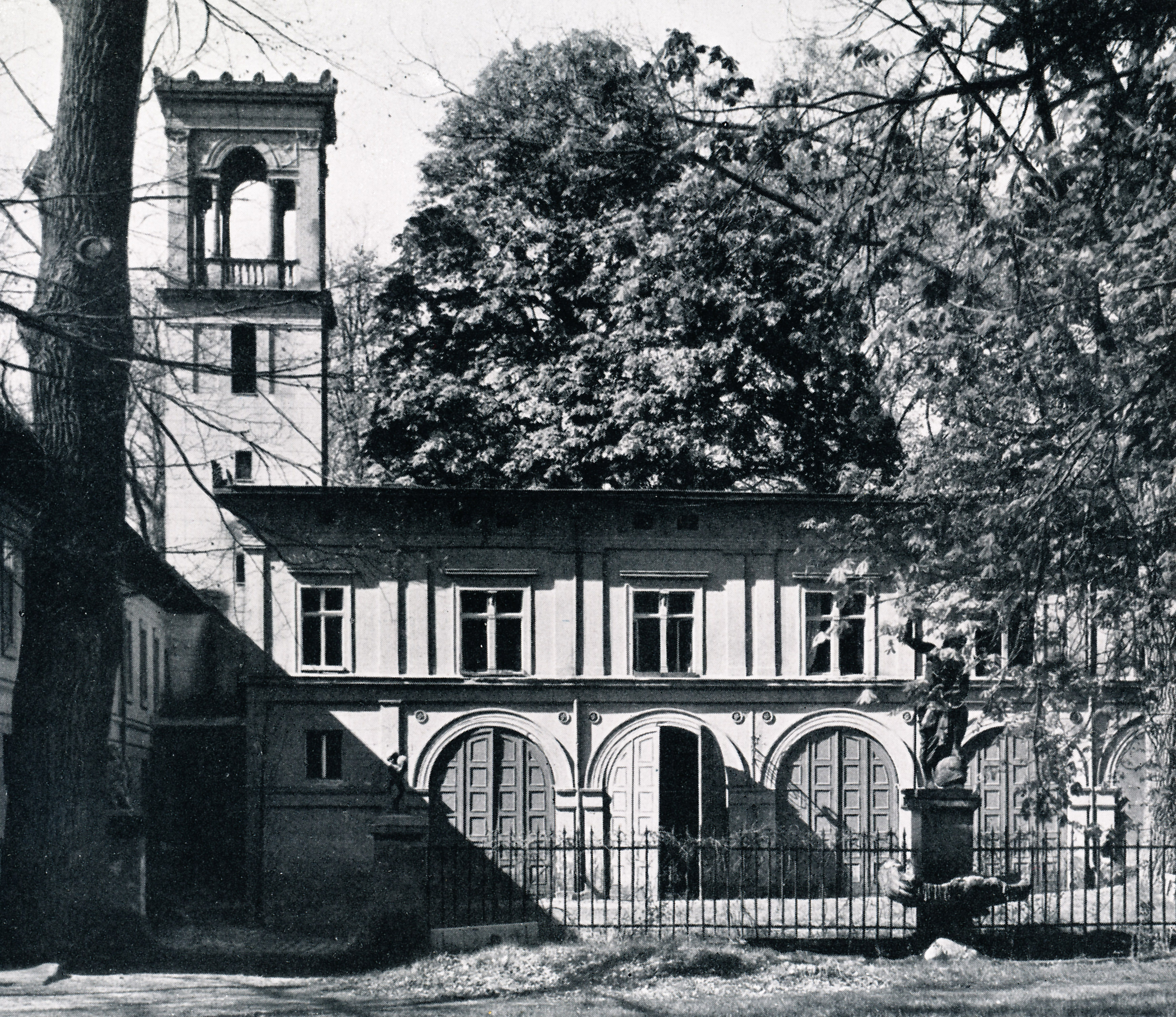 Der Remisenhof nach der Aufstockung von Turm und Remise, Foto Robert Scholz, um 1875